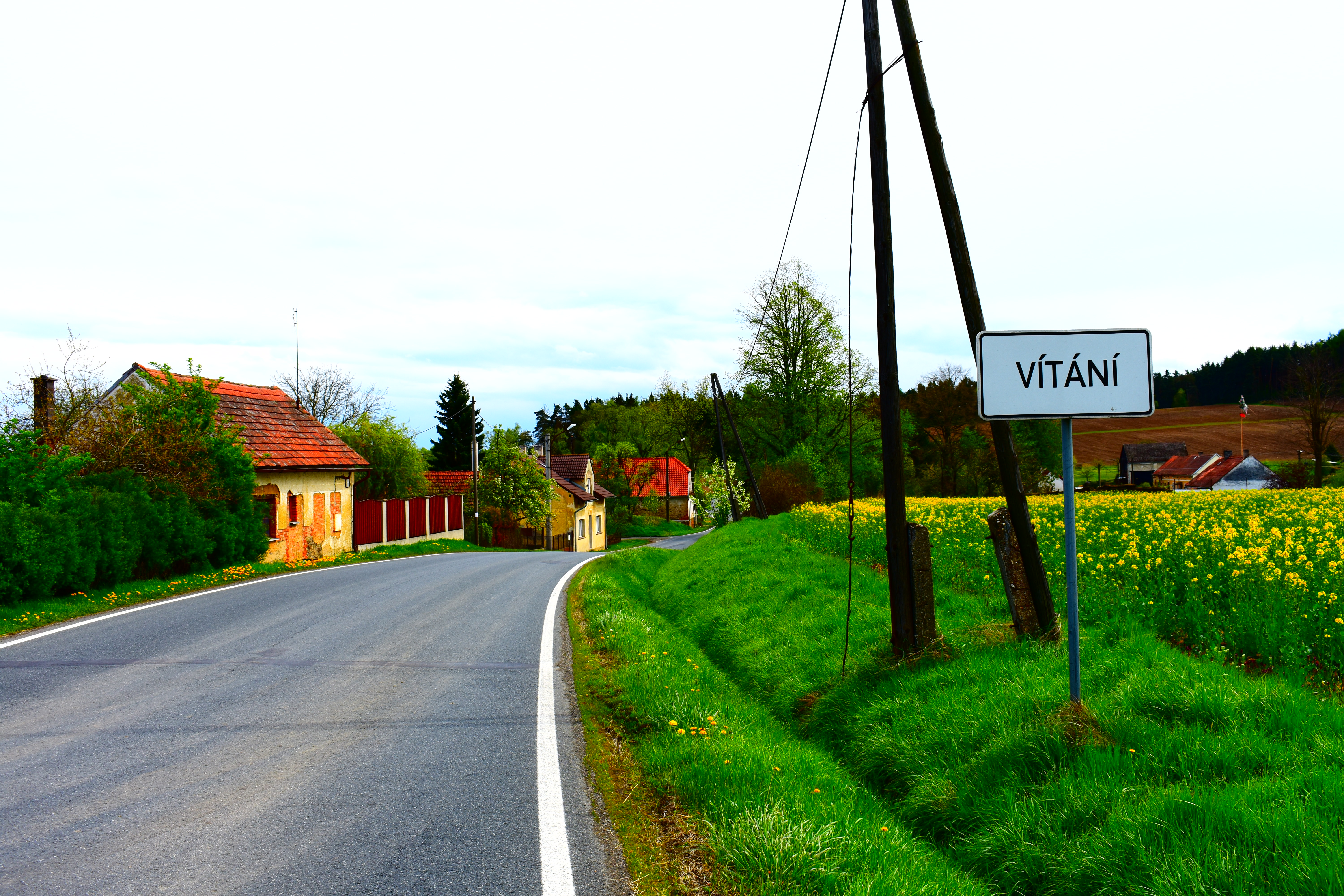 Vítání